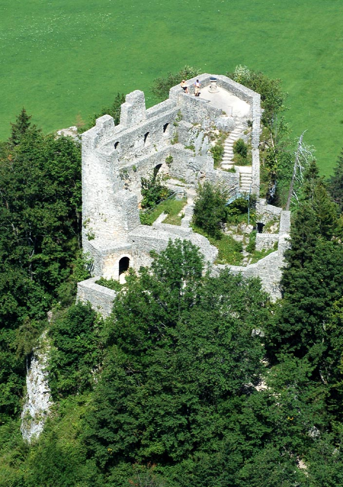 Burg Wartenfels (924 m) vom Westgrat des Schobers